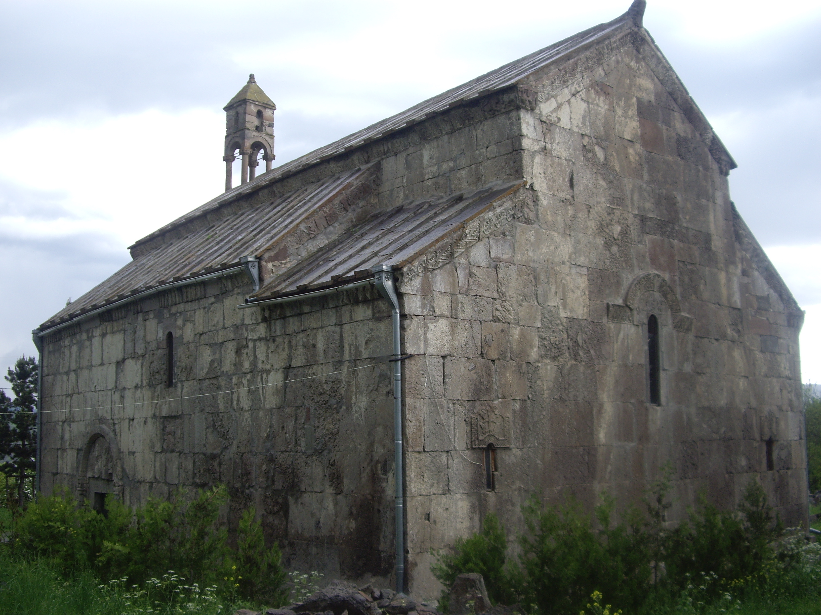 ვალეს ღვთისმშობლის ეკლესიის საერთო ხედი